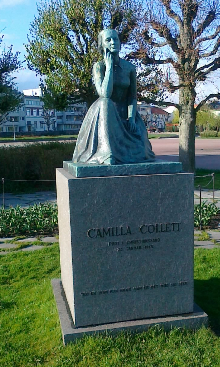 Statue av Camilla Collett (Strandprommenaden, Kristiansand)